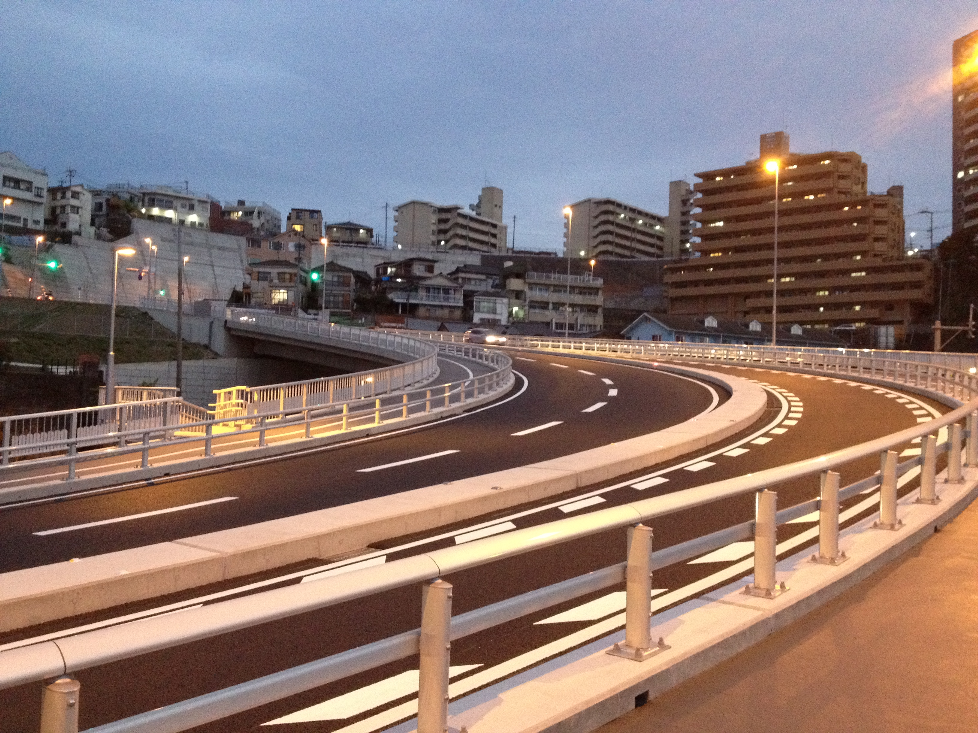 鹿児島市道高麗通線の唐湊四丁目付近の画像。